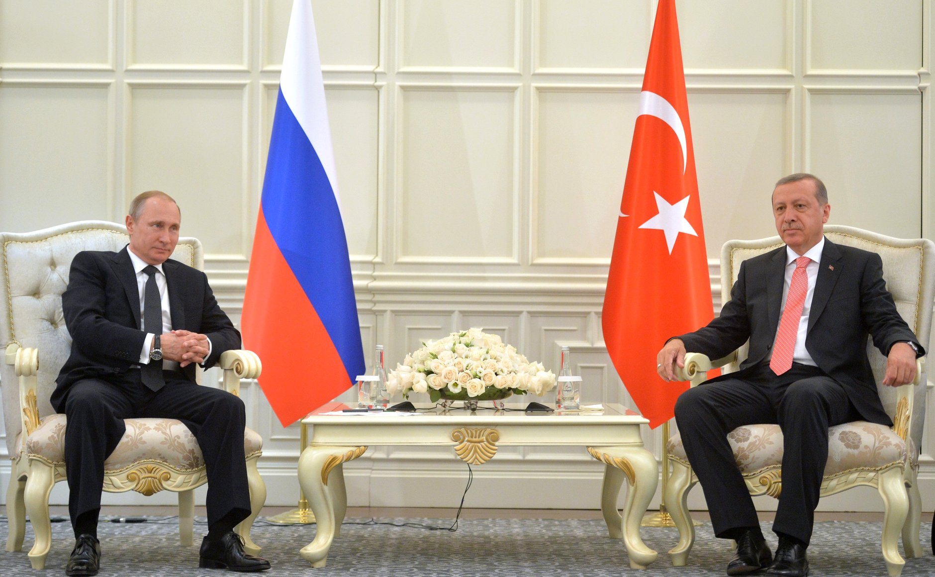 Встреча Президента России Владимира Путина с Президентом Турции Реджепом Тайипом Эрдоганом в Баку